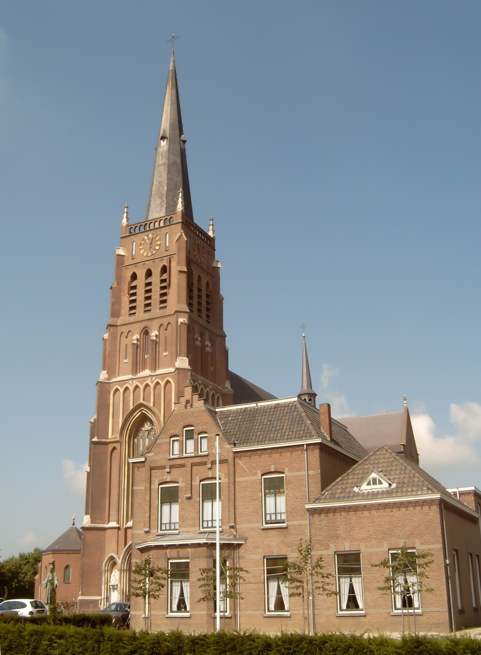 Dreumel, kerk